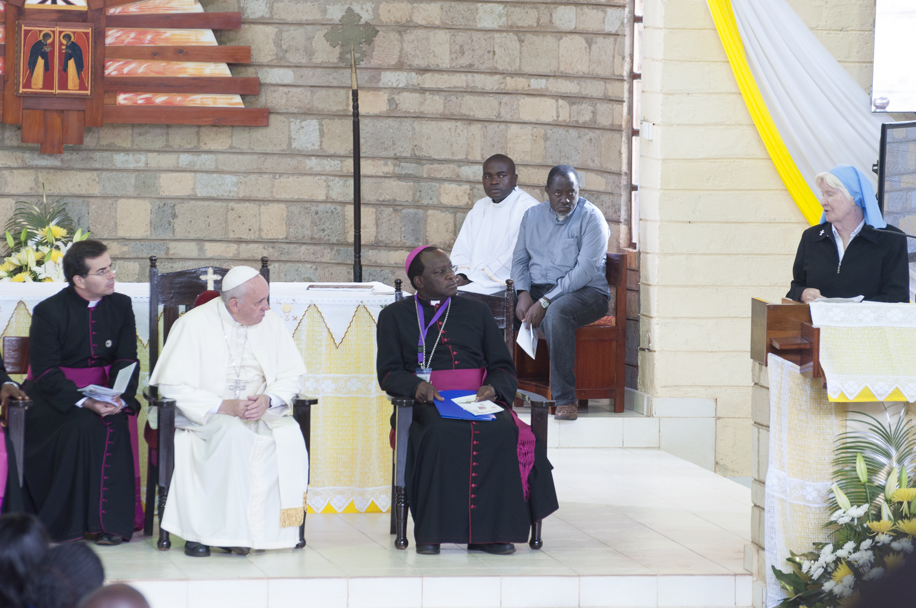 Le pape François à St. Joseph Kangemi lors de son voyage au Kenya en novembre 2015.